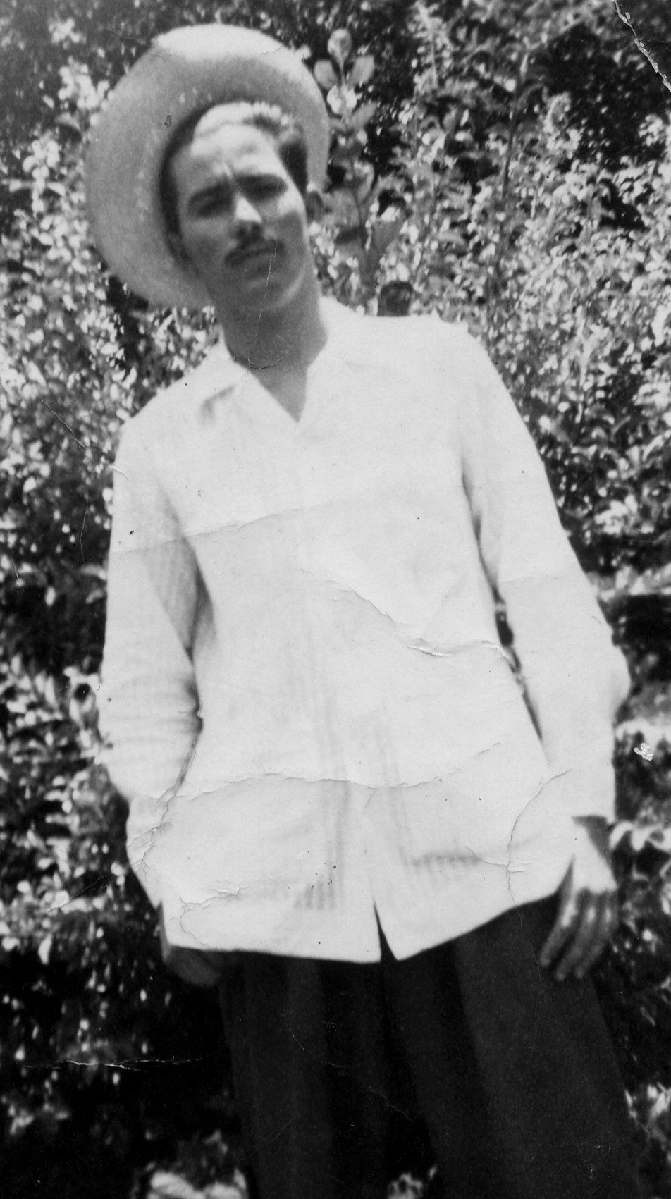 Foto de Ifrain Caraballoso Iglesias con ropa tipica en Guayacanes Cuba a mediados de los 1950, sombrero de paja, guayabera blanca y pantalón bombacha. Foto donada por Mirtha Alonso Morffi (esposa de Ifrain)